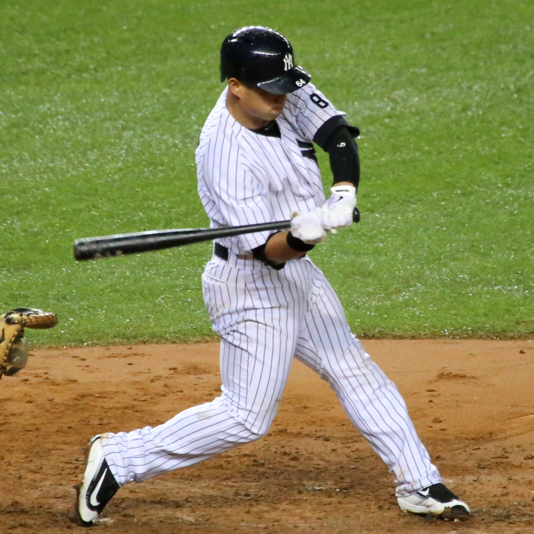 Rob Refsnyder